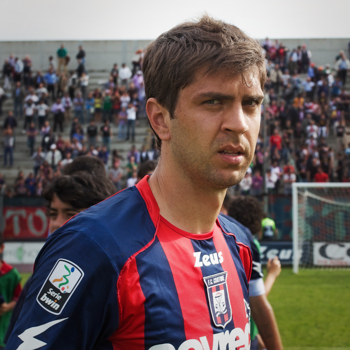 Primo piano di Caetano Prósperi Calil